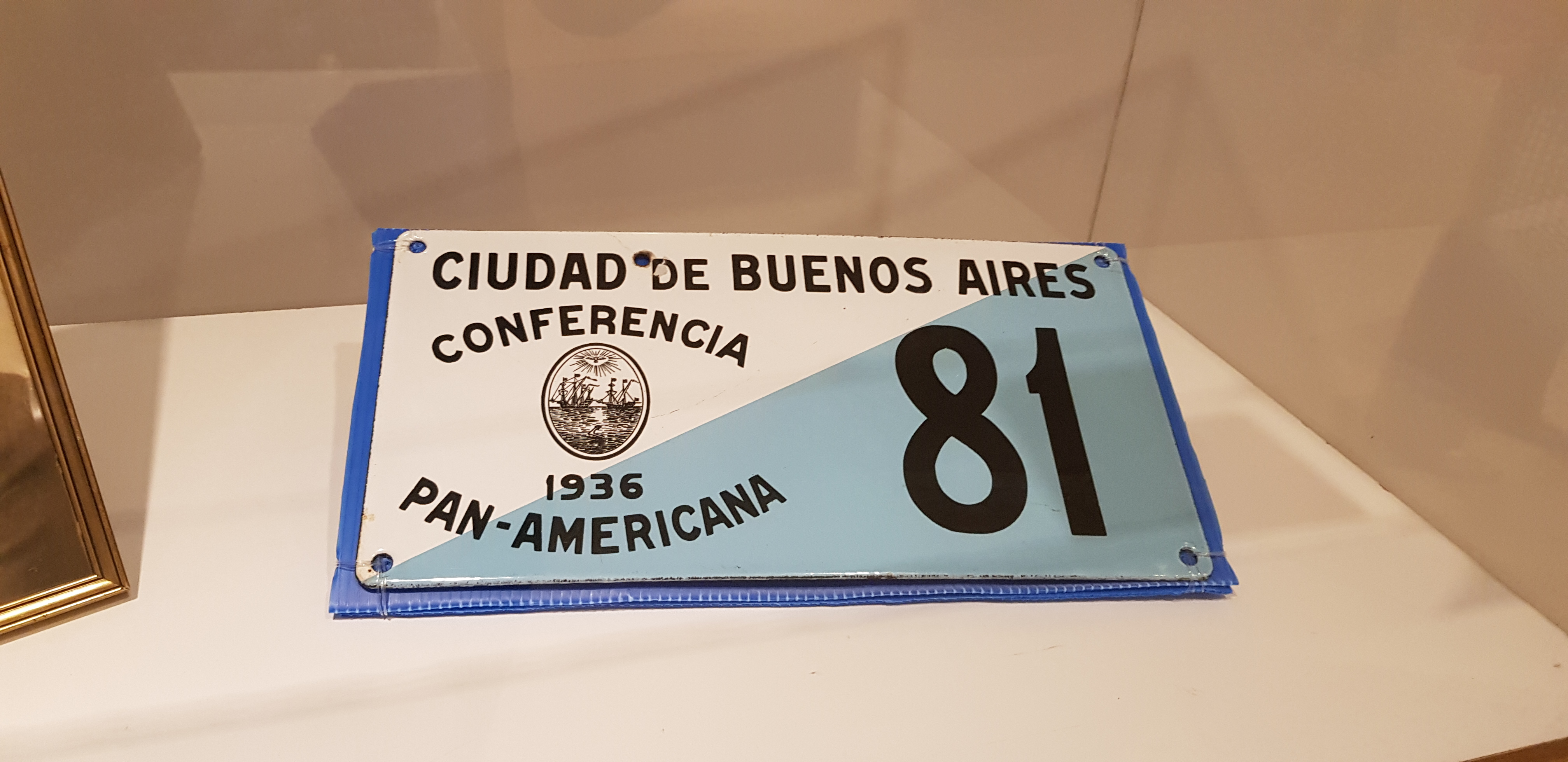 Chapa para automóviles parte de las delegaciones de la Conferencia Panamericana de 1936 en Buenos Aires. Exhibida en el Palacio San Martín como parte de su museo.